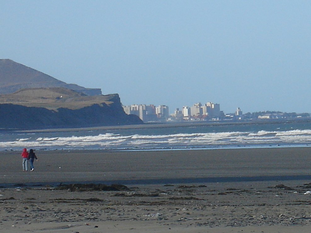 Comodoro Rivadavia